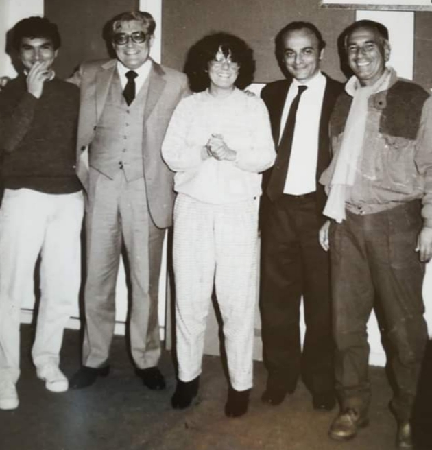 Eduardo Angeloz en LU3 Radio Del Sur 1989